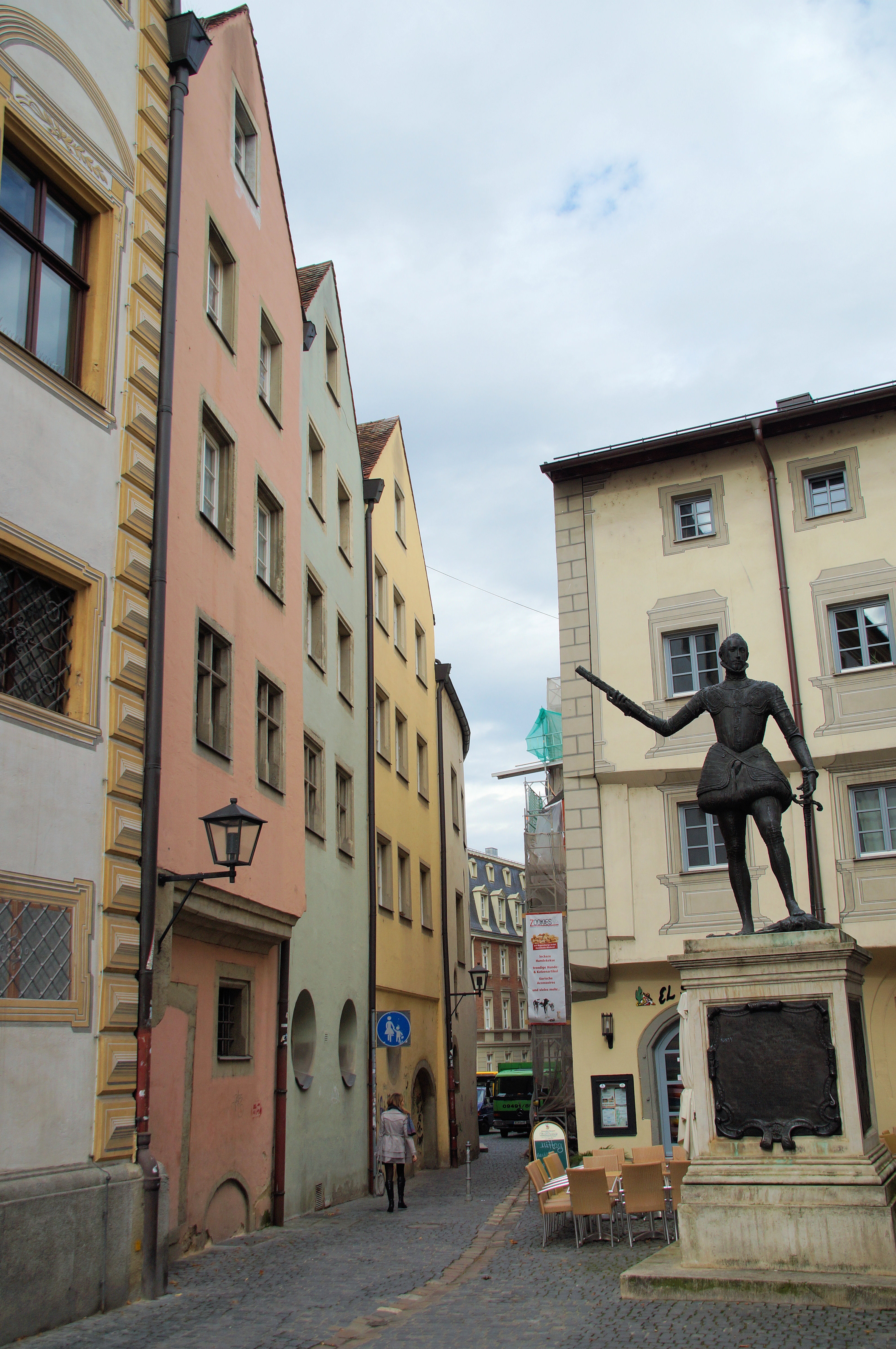 Baukomplex aus vier Bauteilen, 1962 bei Sanierung zusammengefasst, südlich drei viergeschossige und giebelständige Satteldachhäuser, um 1300 und später, im Erdgeschoss der "Dollingersaal", 1962 wiederaufgebaut, nördlich dreigeschossiges und traufständiges Satteldachhaus, 2. Viertel 13. und 15. Jh. (im Bild links) This is a photograph of an architectural monument.